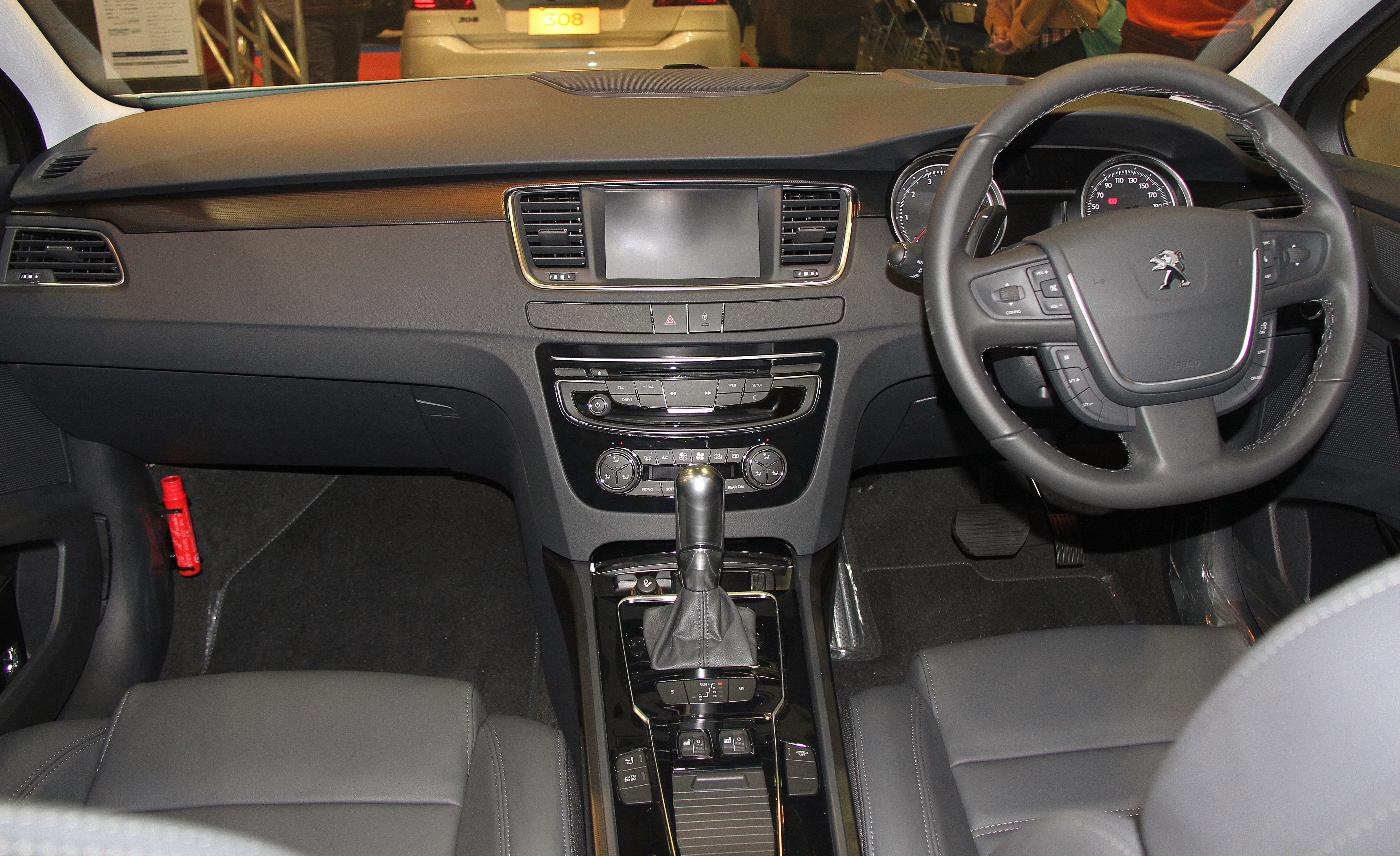 Peugeot 508